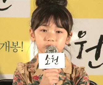 영화 (소원) 언론 배급시사회 & VIP 시사회 현장 (이레)